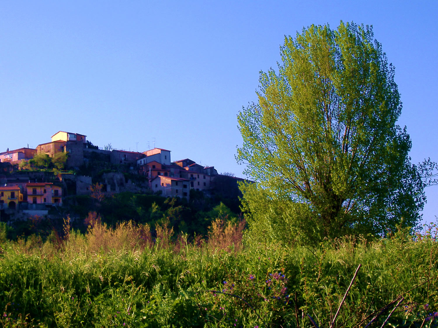 scorcio suggestivo del borgo antico di Candida